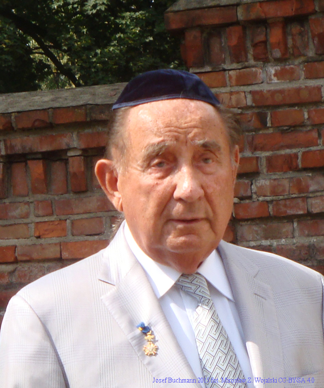 Josef Buchmann portret w Łodzi 28 sierpnia 2015 fot Mirosław Z. Wojalski